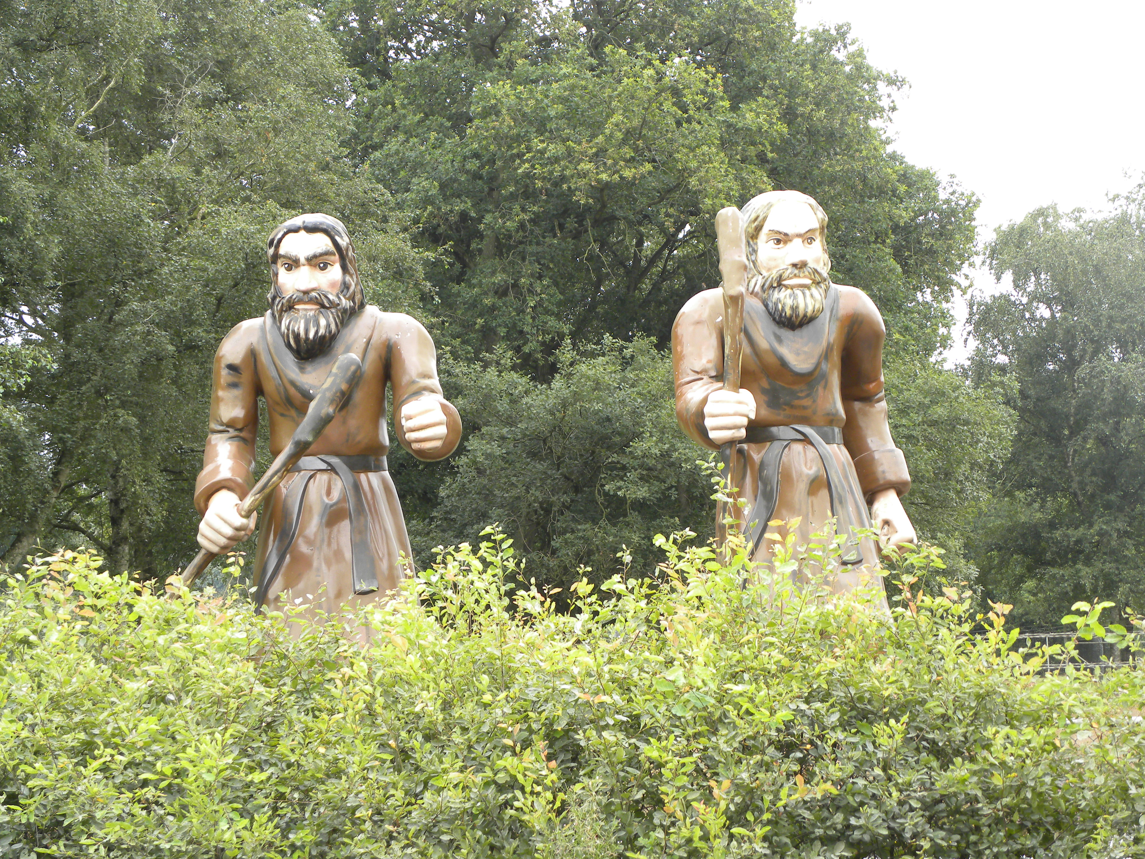 Deze foto is gemaakt bij het openluchtmuseum "Ellert en Brammert" in Schoonoord (Nederland). This picture was taken at the "Ellert and Brammert" open air museum in Schoonoord (Netherlands) Ellert Brammert Schoonoord